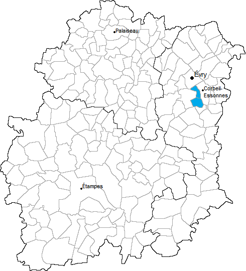 Carte de localisation du canton de Corbeil-Essonnes-Ouest en Essonne (91)